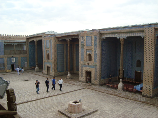 Harem de Tach Khaouli (Khiva), vue sur la cour et les iwans